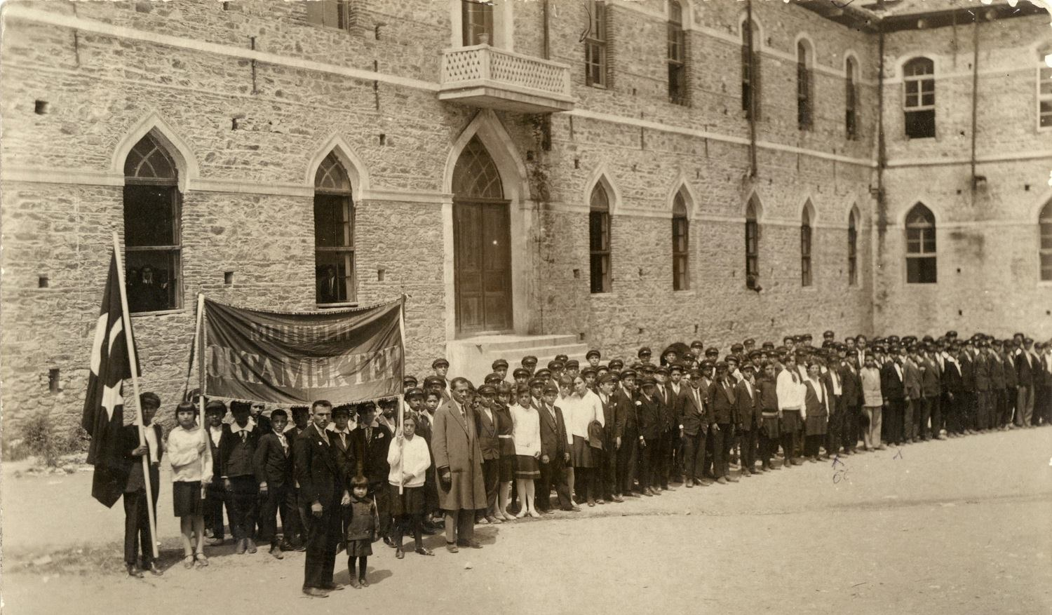 Denizli Lisesi 1932 yılından bir fotoğraf